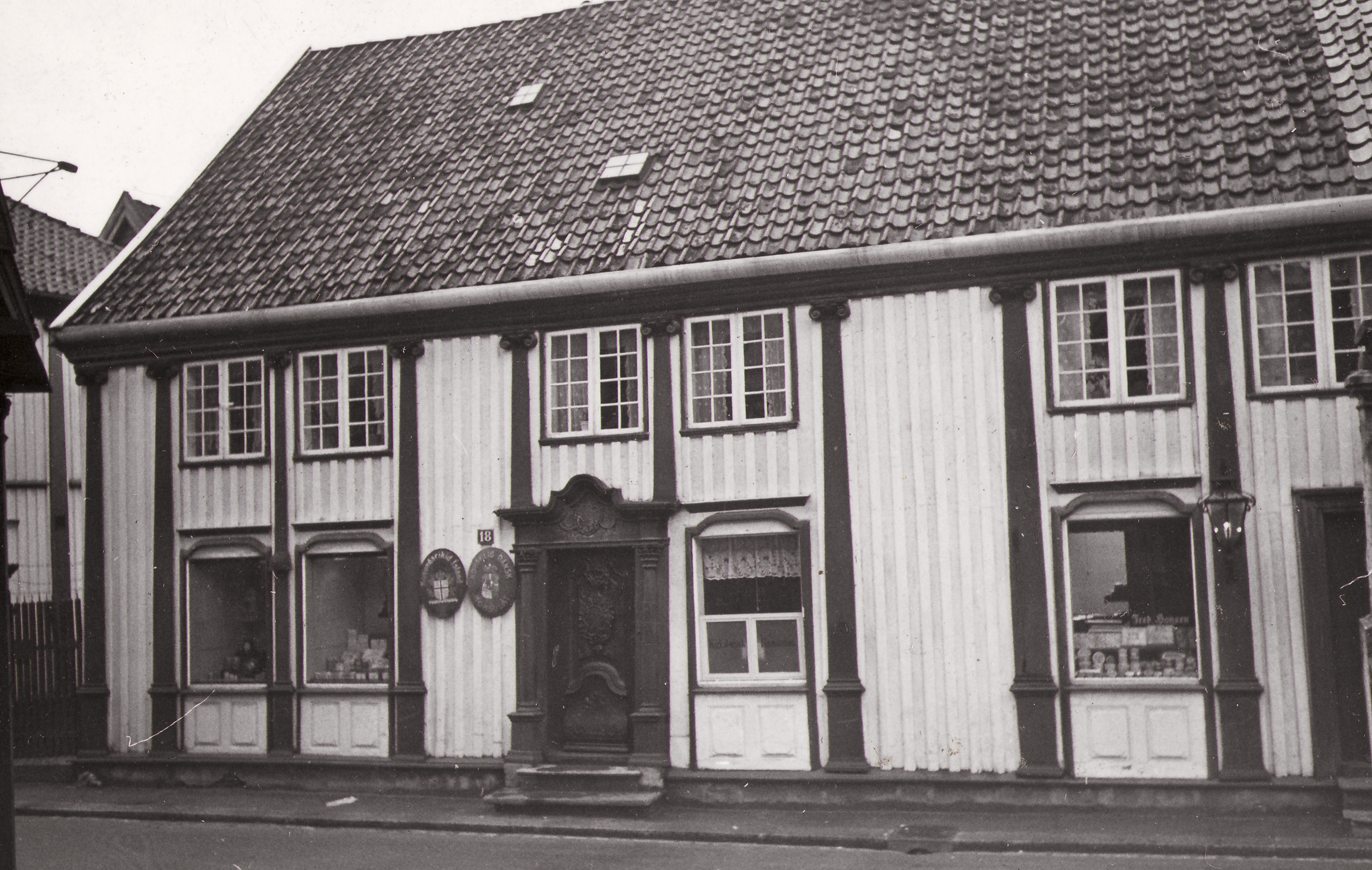 Konsul Fredrik Hansens hus, Skagen 18 i Stavanger, Rogaland